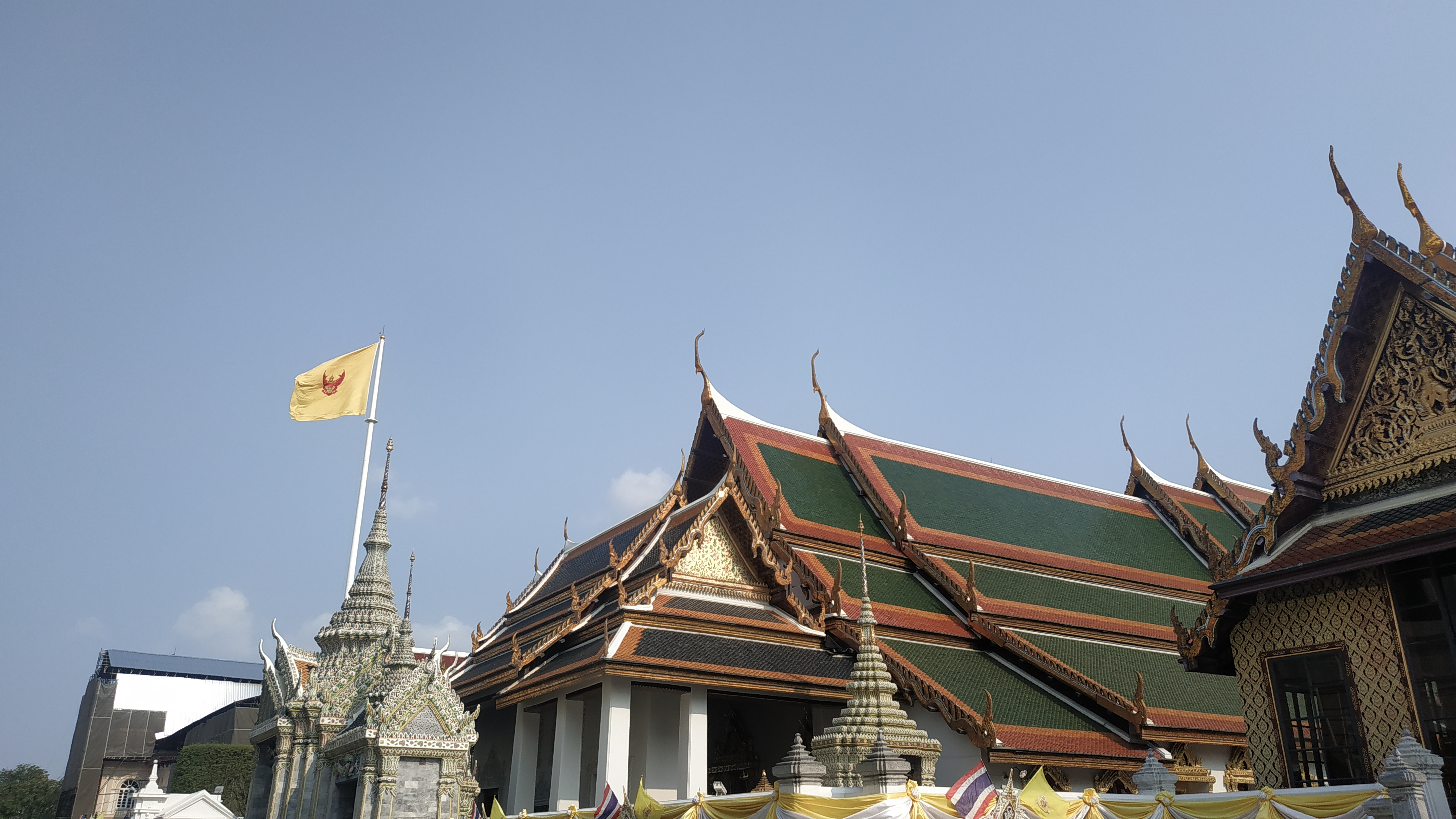 เสาธงมหาราชที่สนามข้างพระที่นั่งบรมพิมาน ภายในพระบรมมหาราชวัง กรุงเทพมหานคร ประเทศไทย บันทึกภาพจากลานด้านหน้าพระที่นั่งอมรินทรวินิจฉัยมไหยสูรยพิมาน เมื่อ 29 กุมภาพันธ์ พ.ศ. 2563